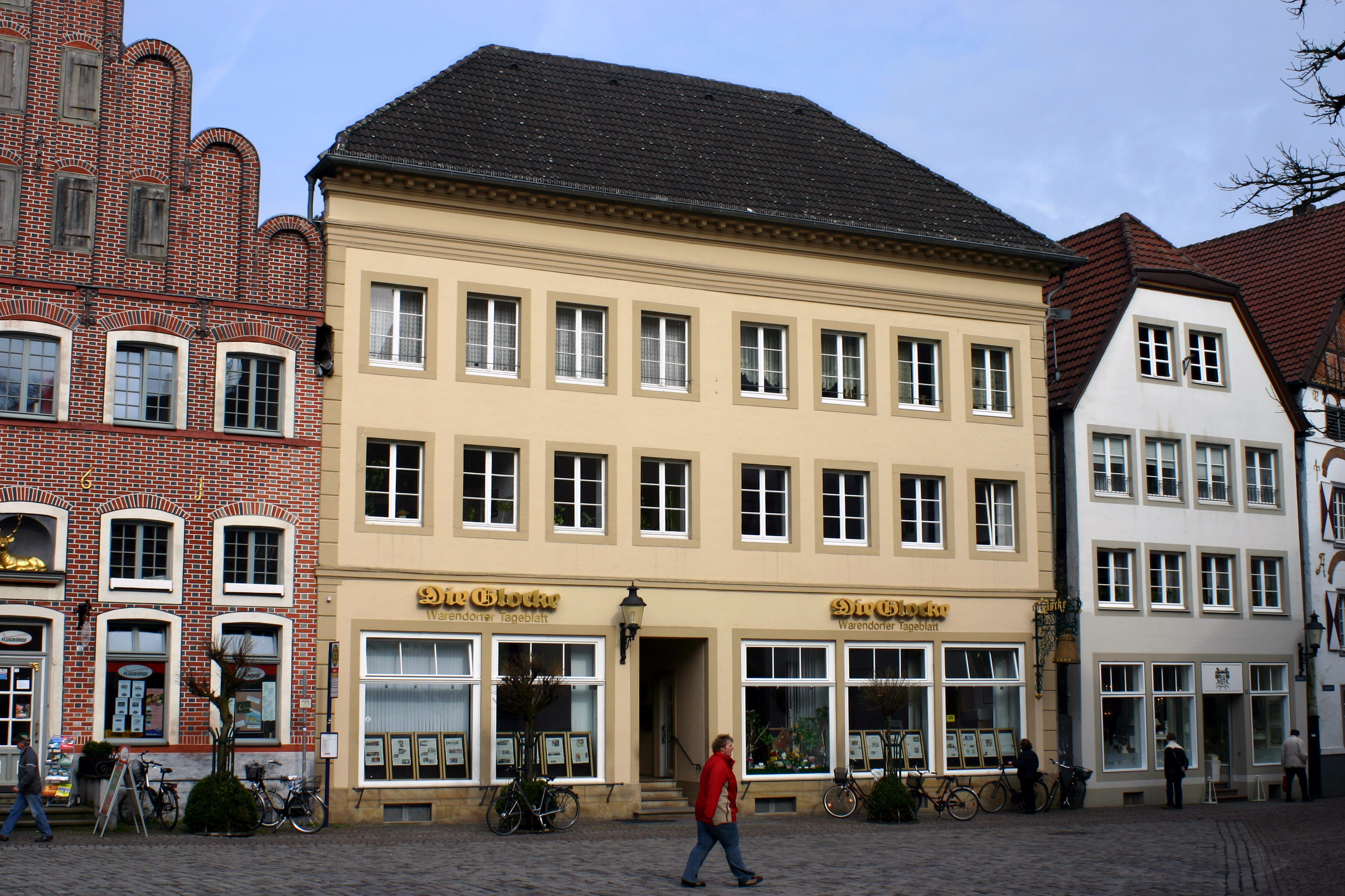 Geschäftsstelle der Tageszeitung "Die Glocke" am markt in Warendorf This image shows a heritage building in Germany, located in the North Rhine-Westphalian city Warendorf (no. 235).